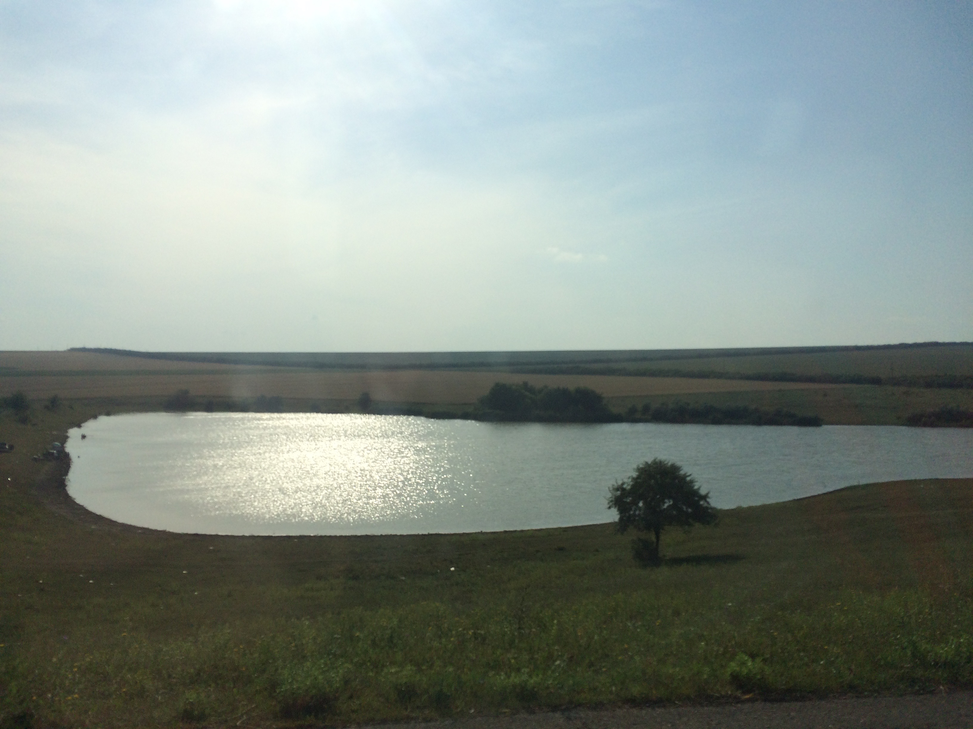 Мисовское водохранилище